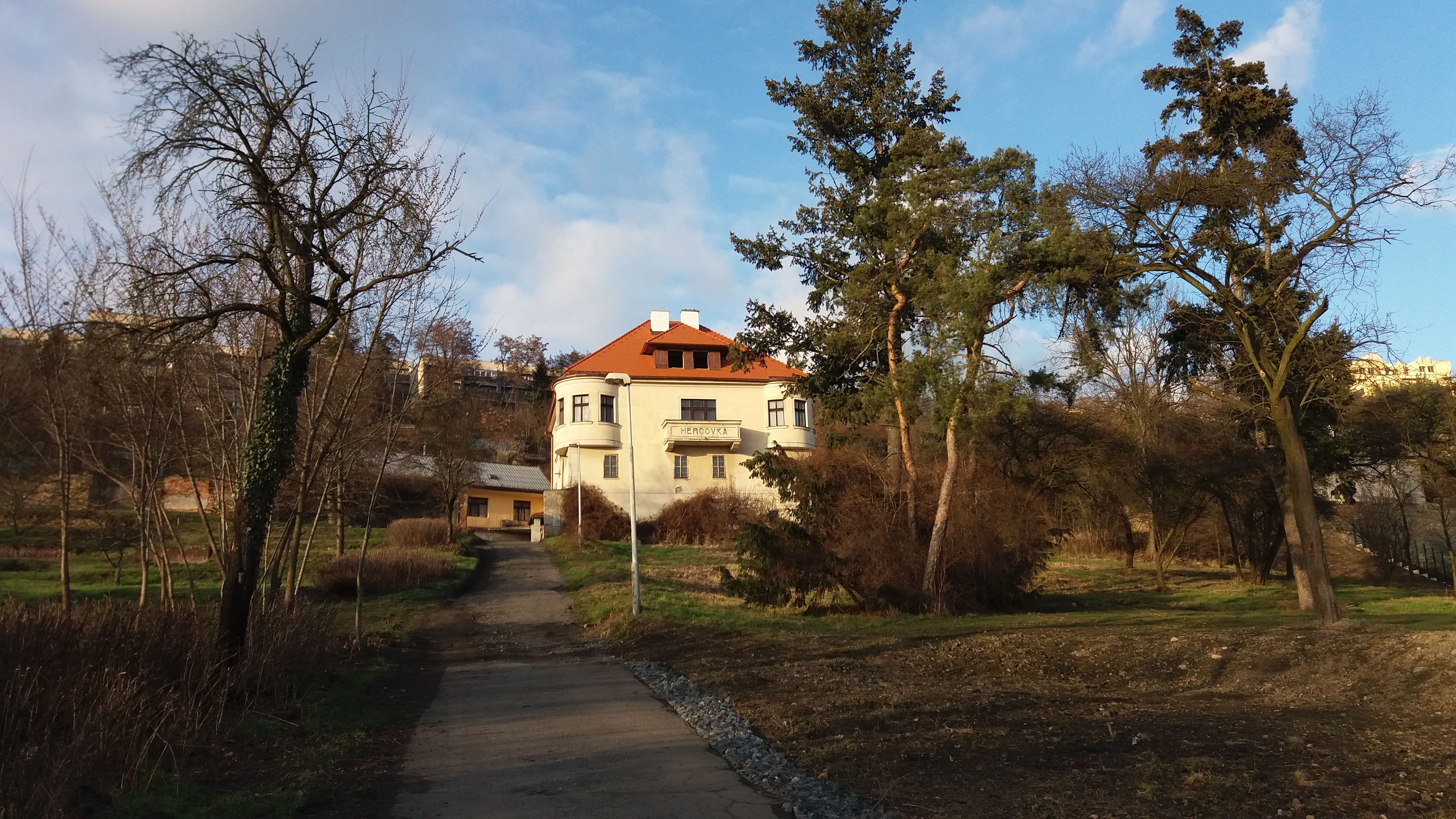 Pražská usedlost Hercovka při pohledu z ulice U Hercovky